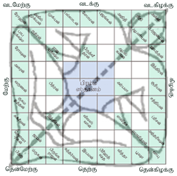 வாஸ்துவும் வாஸ்தூ மண்டலமும்